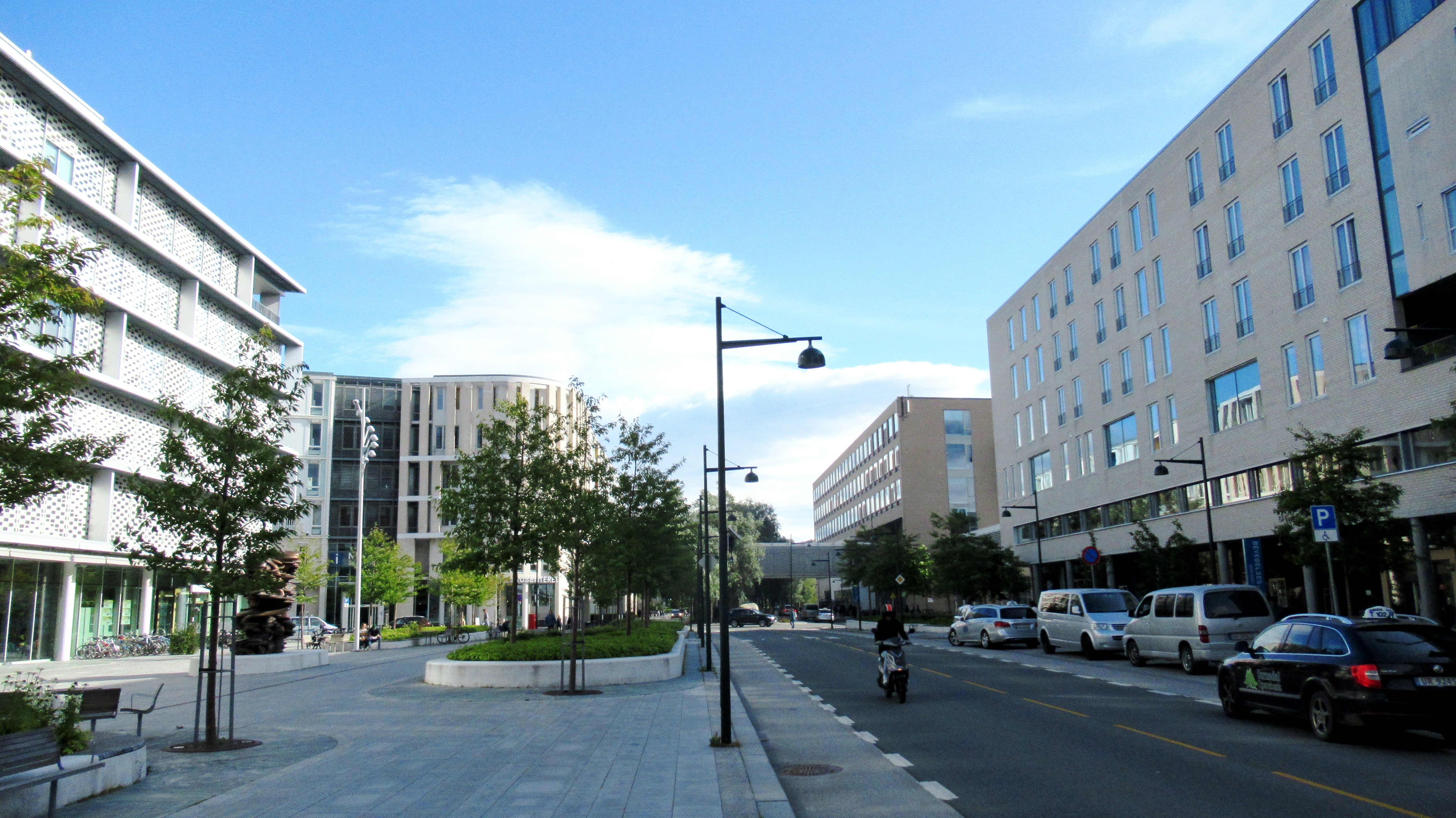 Olav Kyrres plass, retning Elgeseter gate (2017)